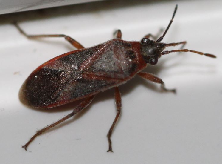 Arocatus longiceps, am 17.10.2017 in Walldorf/Baden